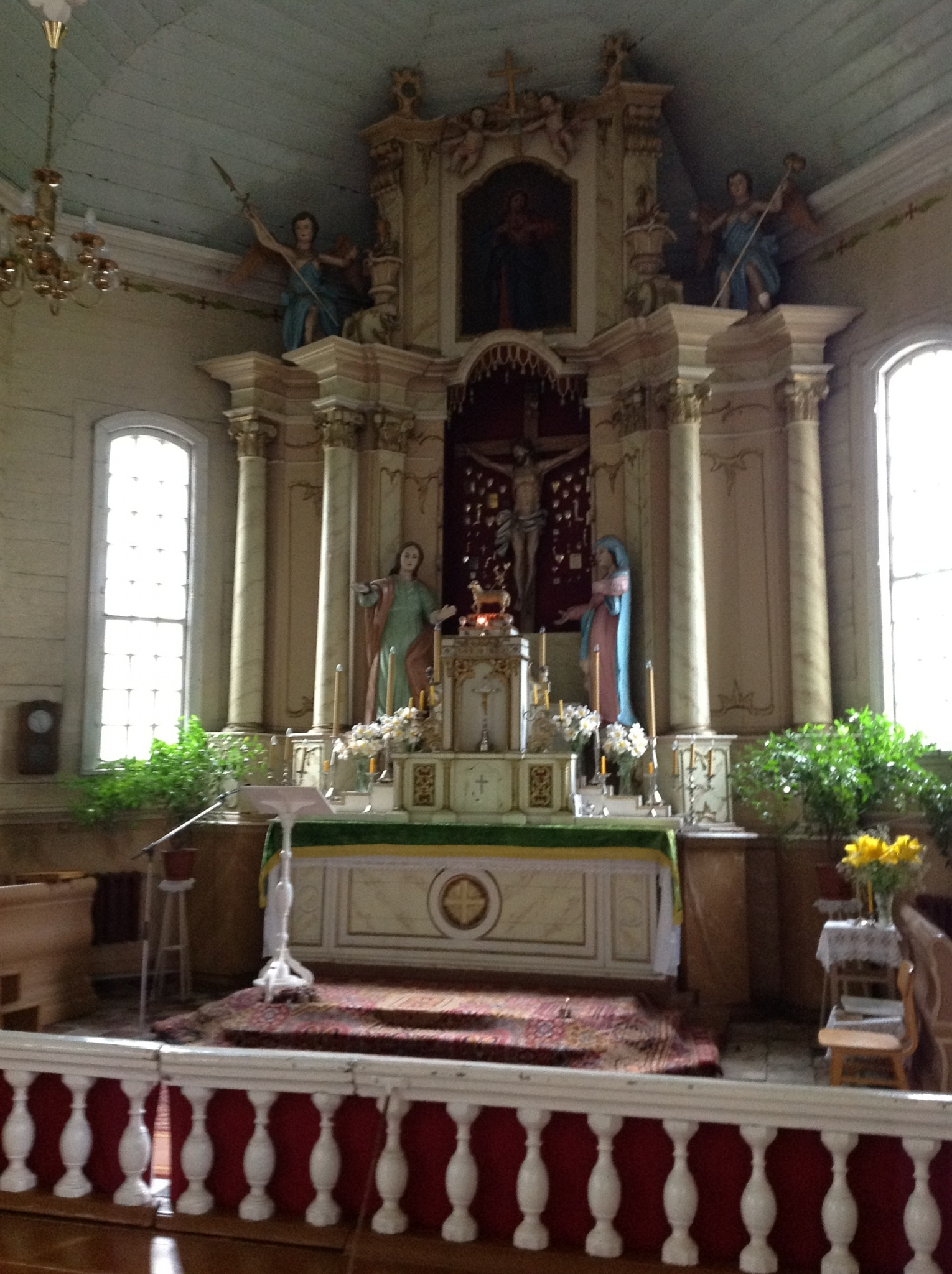 Malnavas Rožukroņa Dievmātes vecās baznīcas galvenais altāris